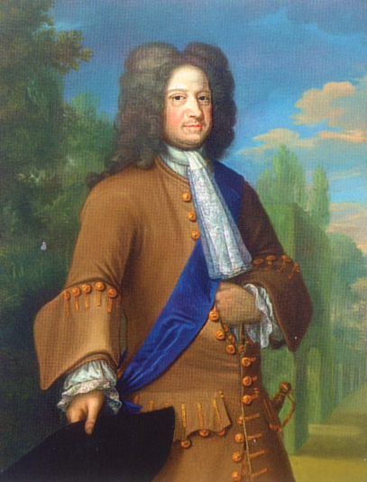 Georg I. (Großbritannien) um 1715